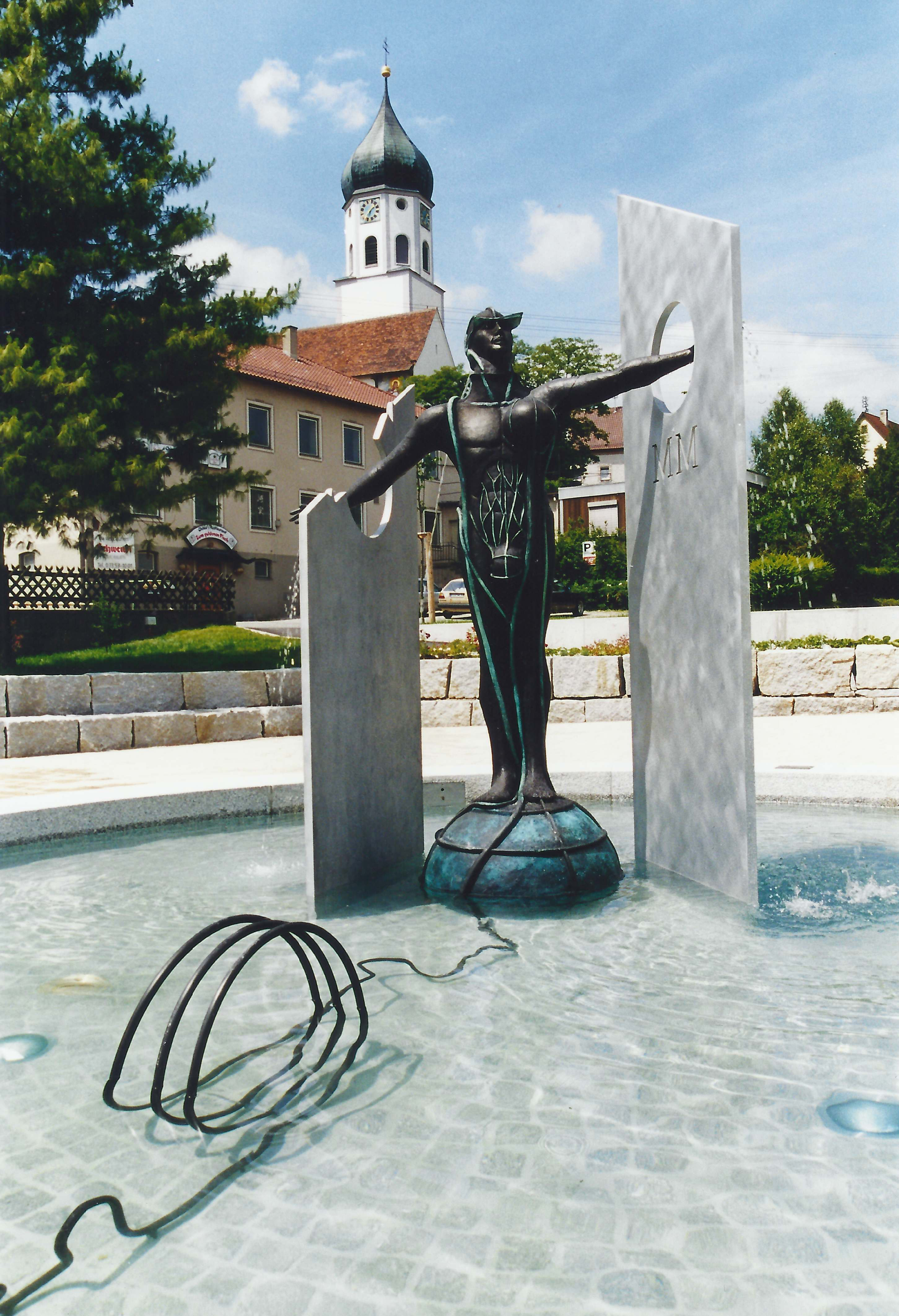 'Millenniumbrunnen von Ursula Stock, Bronze, Aluminium, 2000, Sigmaringen-Laiz, Am Rathaus 2.